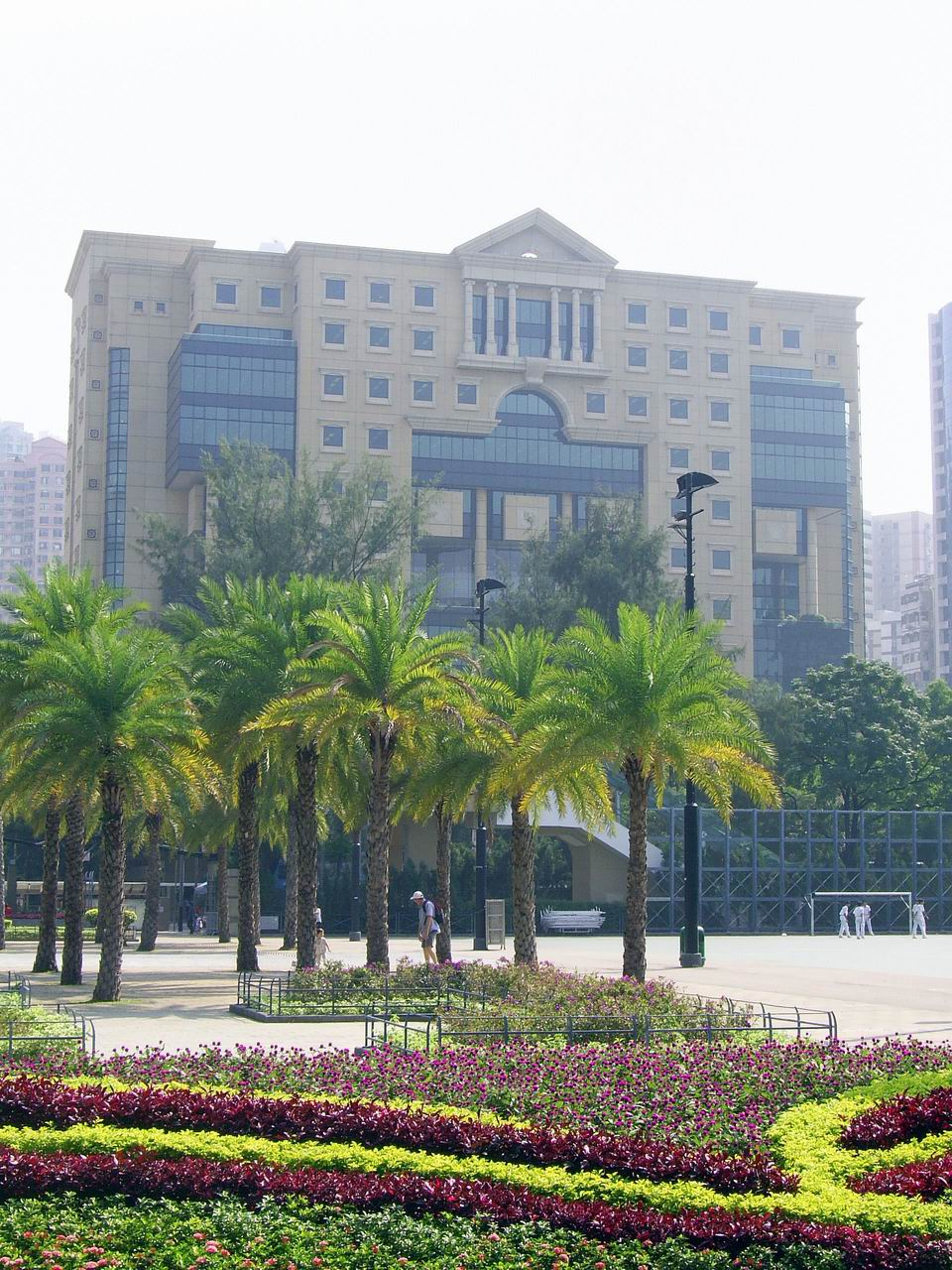 中文（香港）: 香港中央圖書館